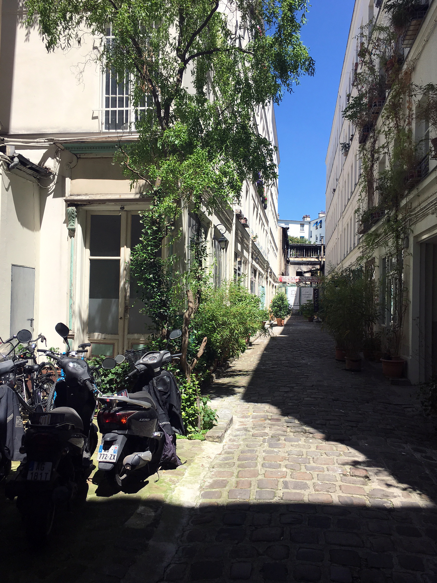 Cours de l'ours. Photo prise en fin de matinée. En fond de la photo, on peut voir les locaux de l'entreprise Tassin qui a brulé en 2015. L'entreprise à ses locaux temporaires en fond de cour sur la gauche au RDC. Toujours au RDC, sur la droite, le chaisier Straure et en regard sur la gauche le cabinet d'ophtalmologie Med-Ophta Paris. Les étages supérieurs, sont des appartement d'habitation.